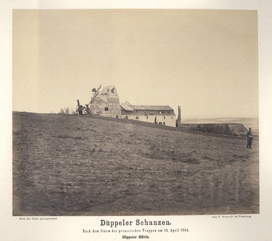 "Düppel-Album" des Fotografen Friedrich Brandt zur Schlacht bei Düppel, 1864 Düppeler Schanzen. Nach dem Sturm der preussischen Truppen am 18. April 1864. Düppeler Mühle.